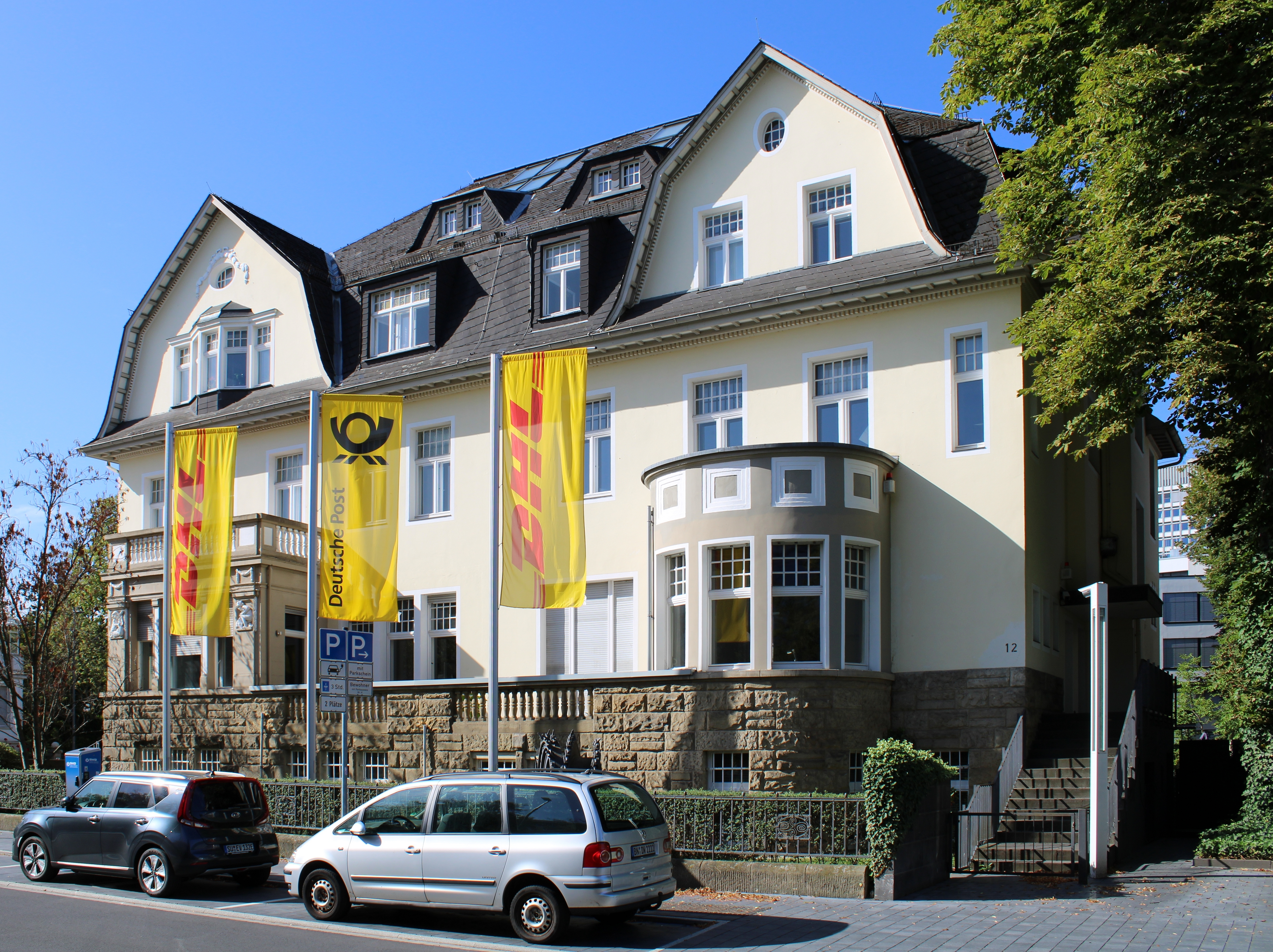 Bonn, Kurt-Schumacher-Str. 12–14: ehemalige (1969-1999) Vertretung des Saarlandes beim Bund. Zum Zeitpunkt der Aufnahme wurde das Gebäude durch die Post AG/DHL genutzt. Das Gebäude ist als Doppelvilla (Kurt-Schumacher-Straße 14/links und 12/rechts) konzipiert.